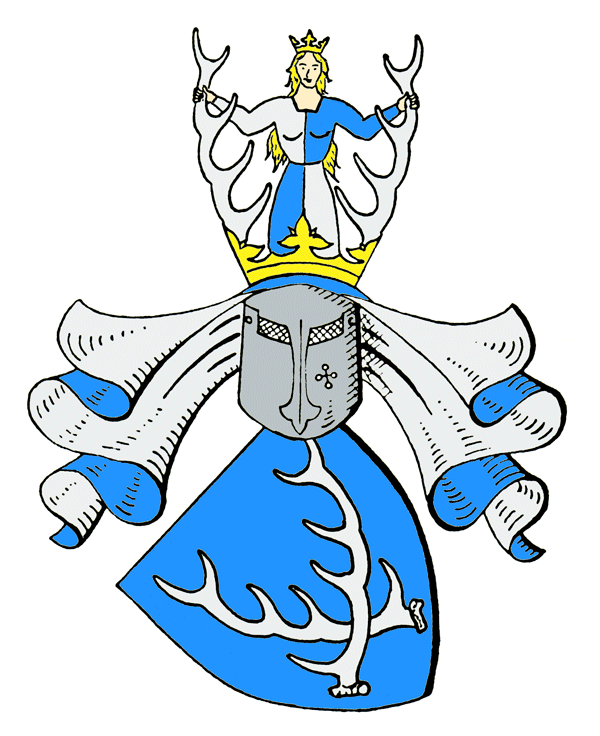 Herb rodu Dohna